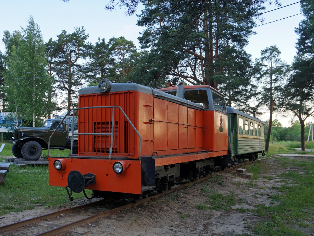 ТУ8-0167 с пассажирским вагоном, Узкоколейная железная дорога Шарьинского музея леса